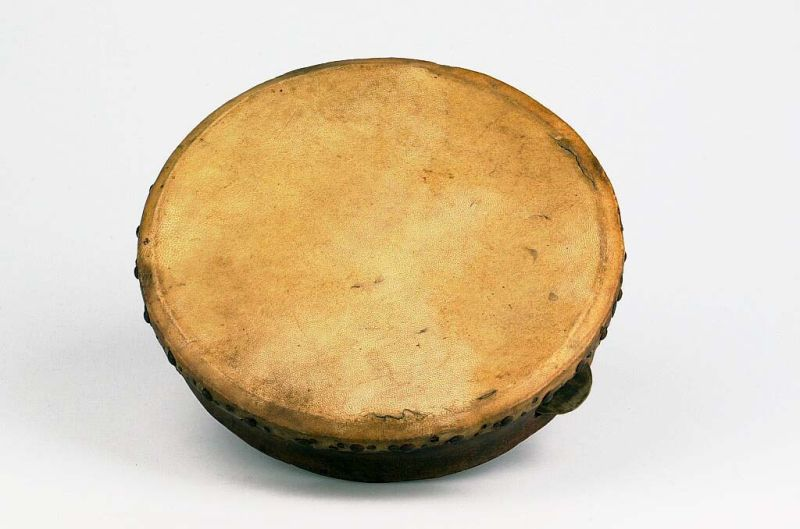 Slaginstrument. Enkelvellige lijsttrom met rinkelschijven Unknown language: Rabana daboes